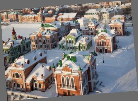 Архангельская слобода